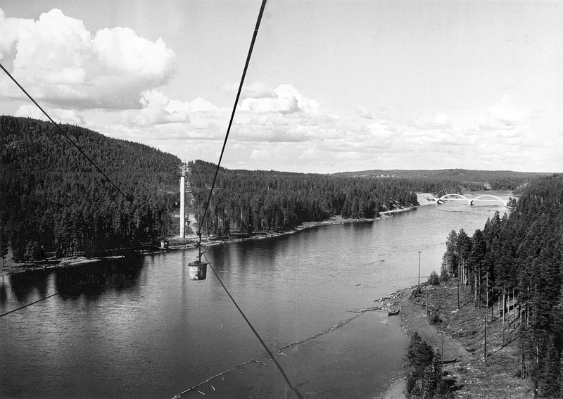 Linbanan passerar Skellefteälven vid Renström.